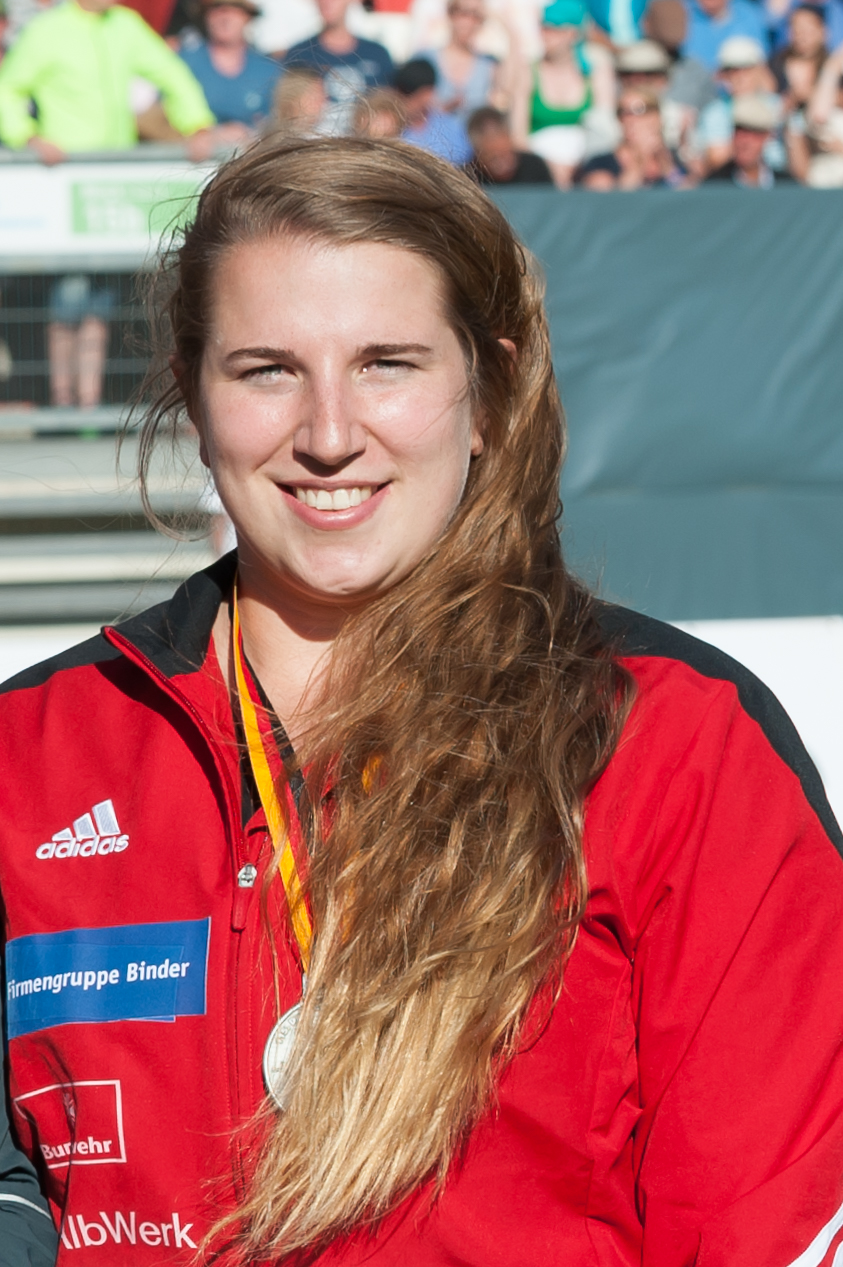 Deutsche Leichtathletik-Meisterschaften 2015: Lena Urbaniak, LG Filstal